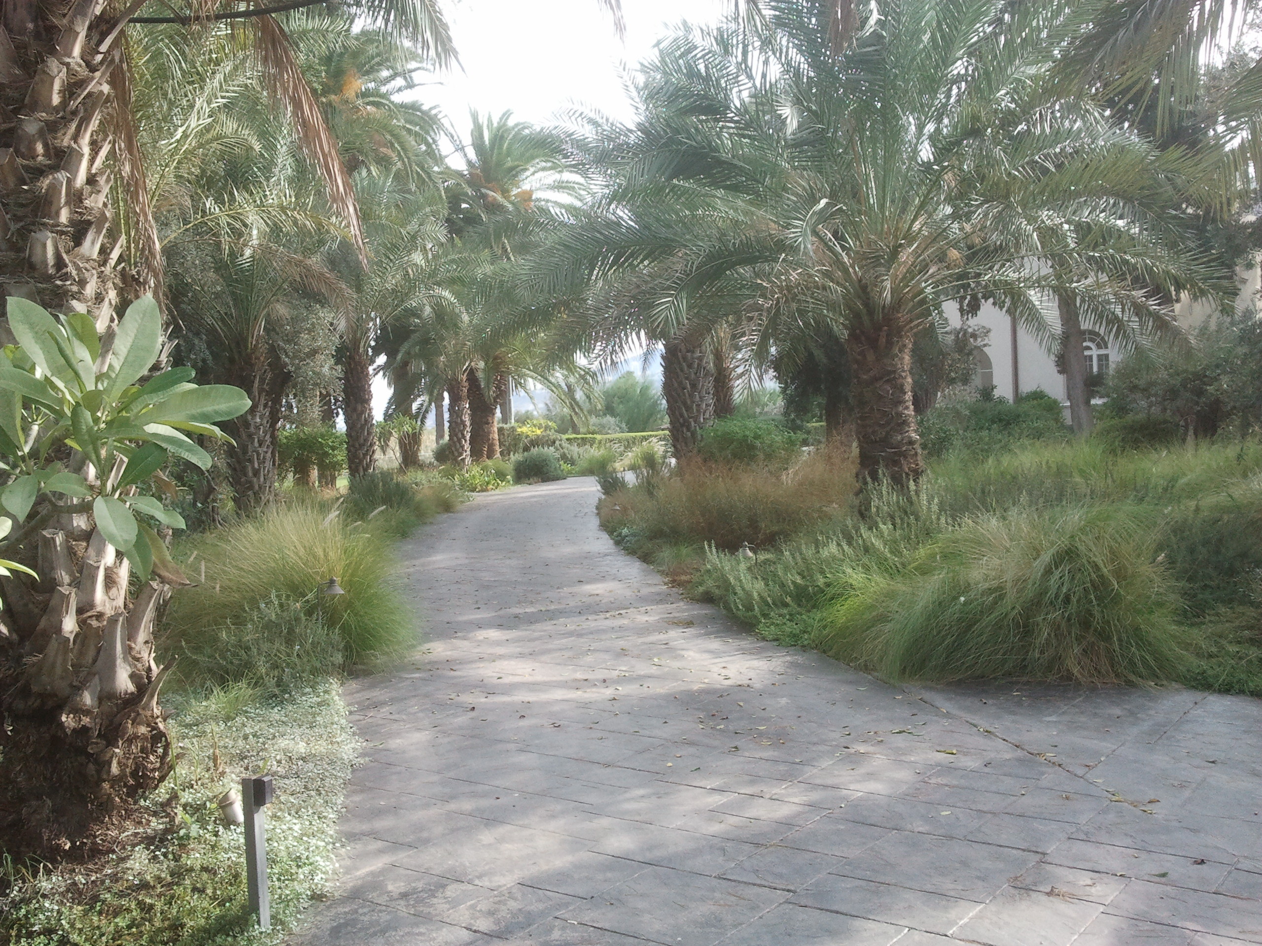 וילה מלצ'ט שוכנת על שפת הכנרת, מול המושבה מגדל, הבית החל להיבנות . בשנת 1928 כבית אירוח של לורד מלצ'ט, במשך השנים הוזנח הבית, בשנות ה-70 של המאה העשרים נרכש על ידי משפחת אייזנבג